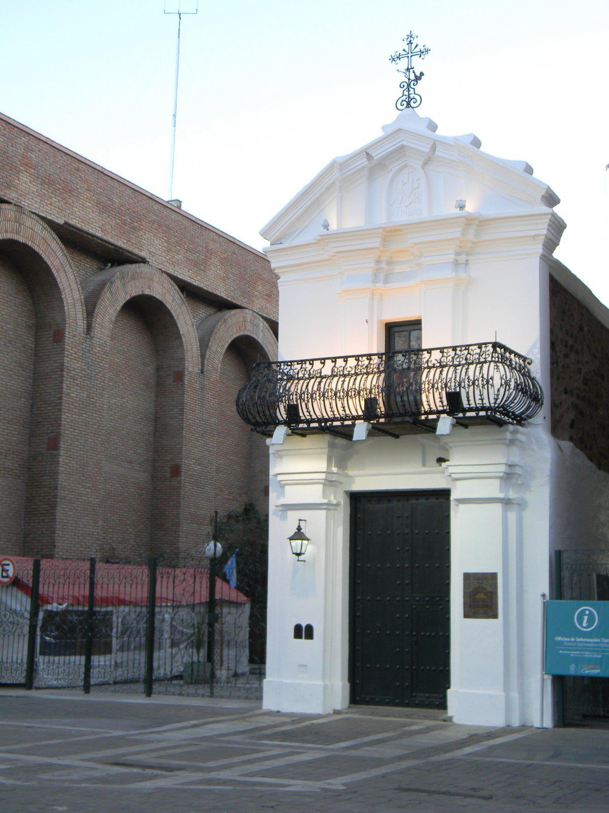 Portal de la antigua casona del Obispo Mercadillo